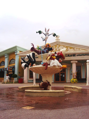 Fuente de los looney tunees